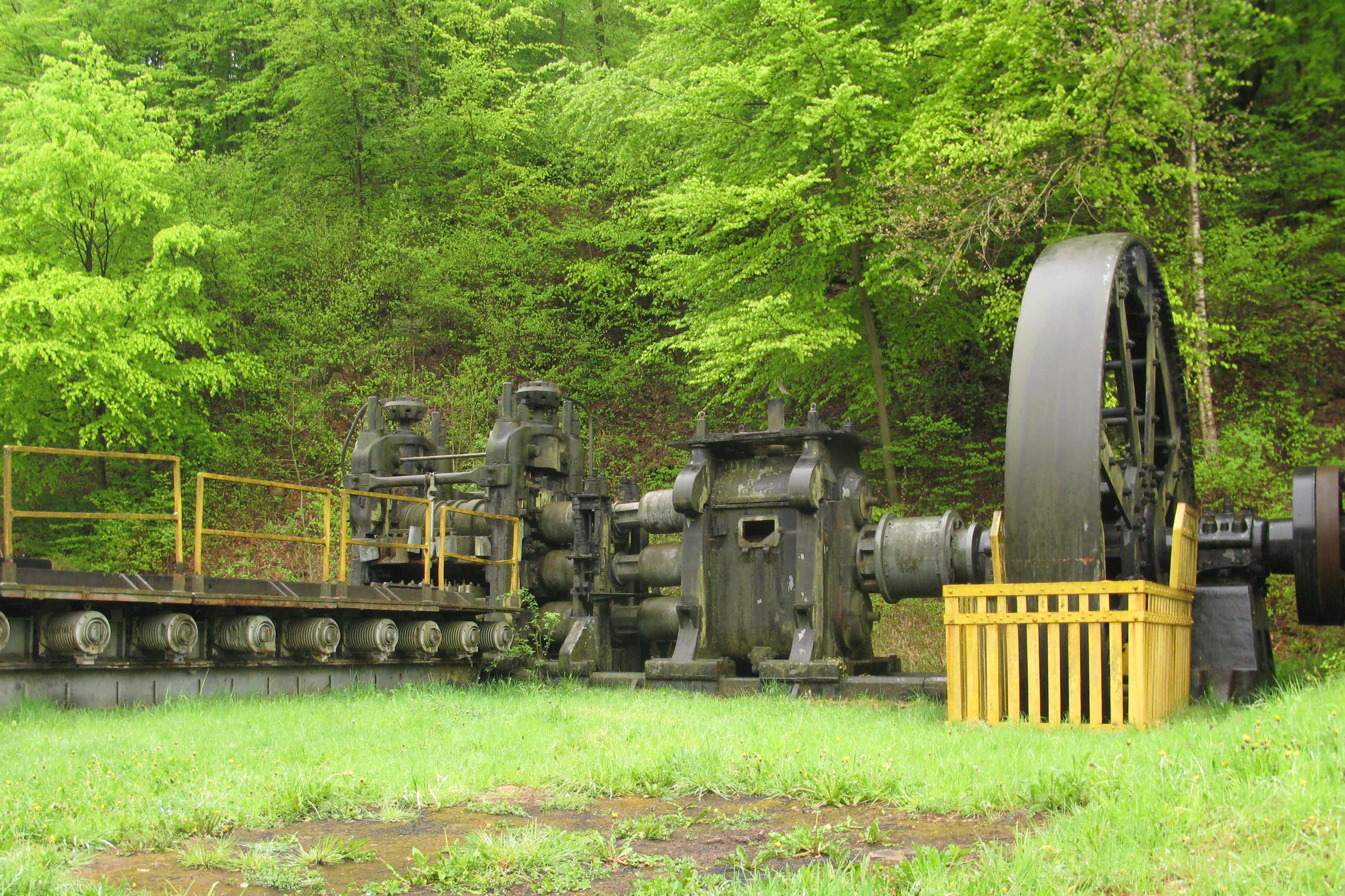 Walzwierk am Industriepark Fond-de-Gras. Kategorie:Industrie- an Eisebunnspark Fond-de-Gras